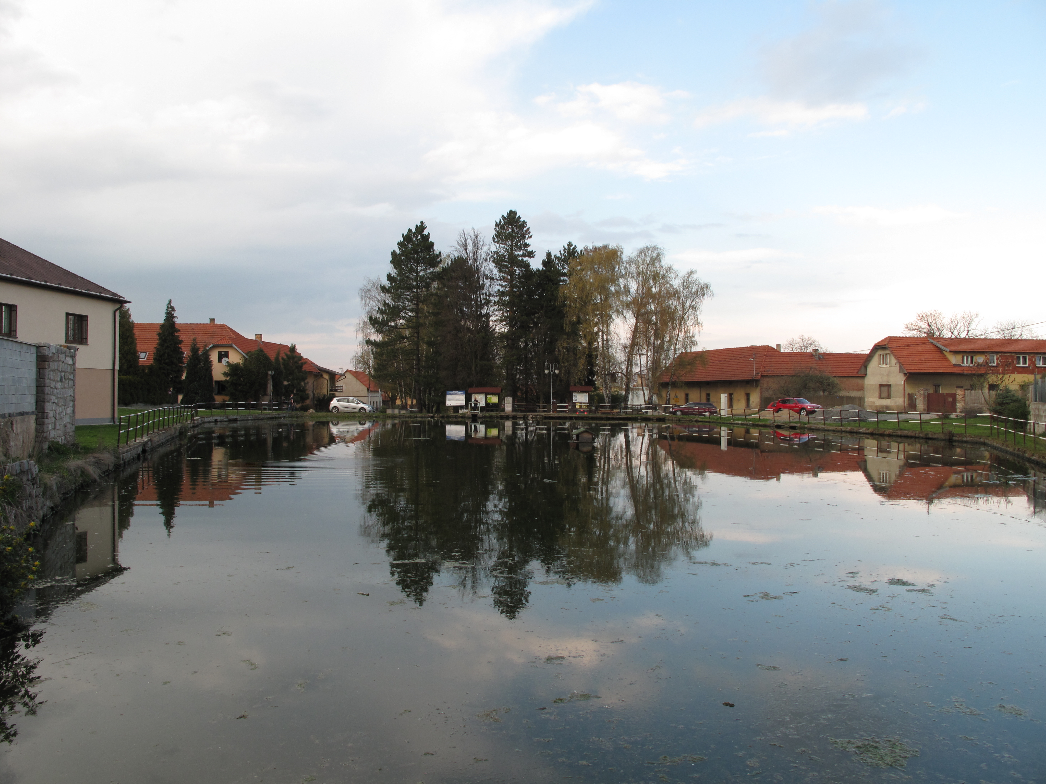 Obecní rybník ve Svojeticích. Okres Praha-východ, Česká republika.